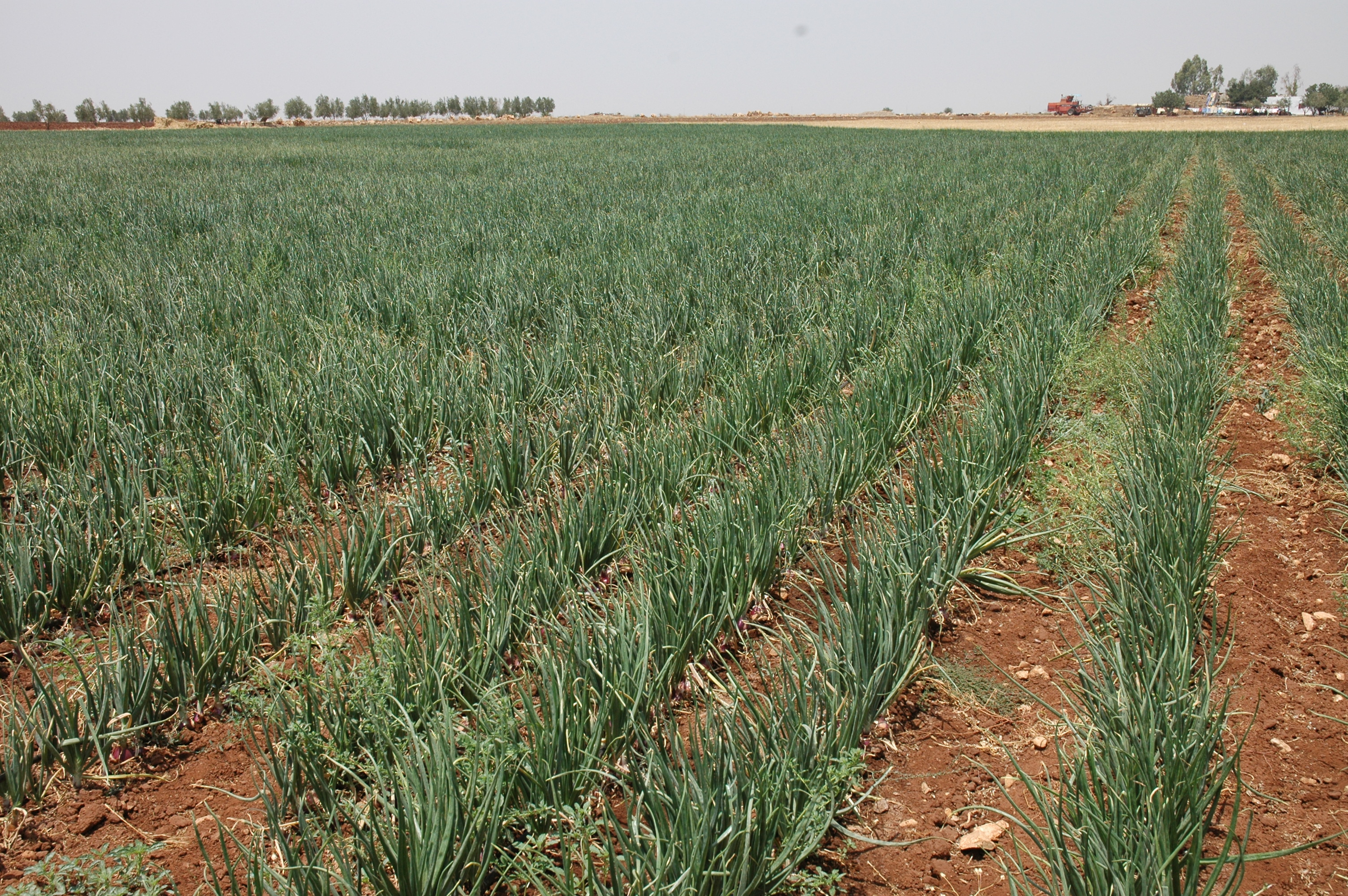 Oignons de plein champ dans la région de Meknès